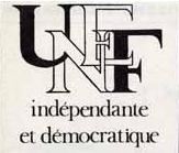 sigle UNEF-ID